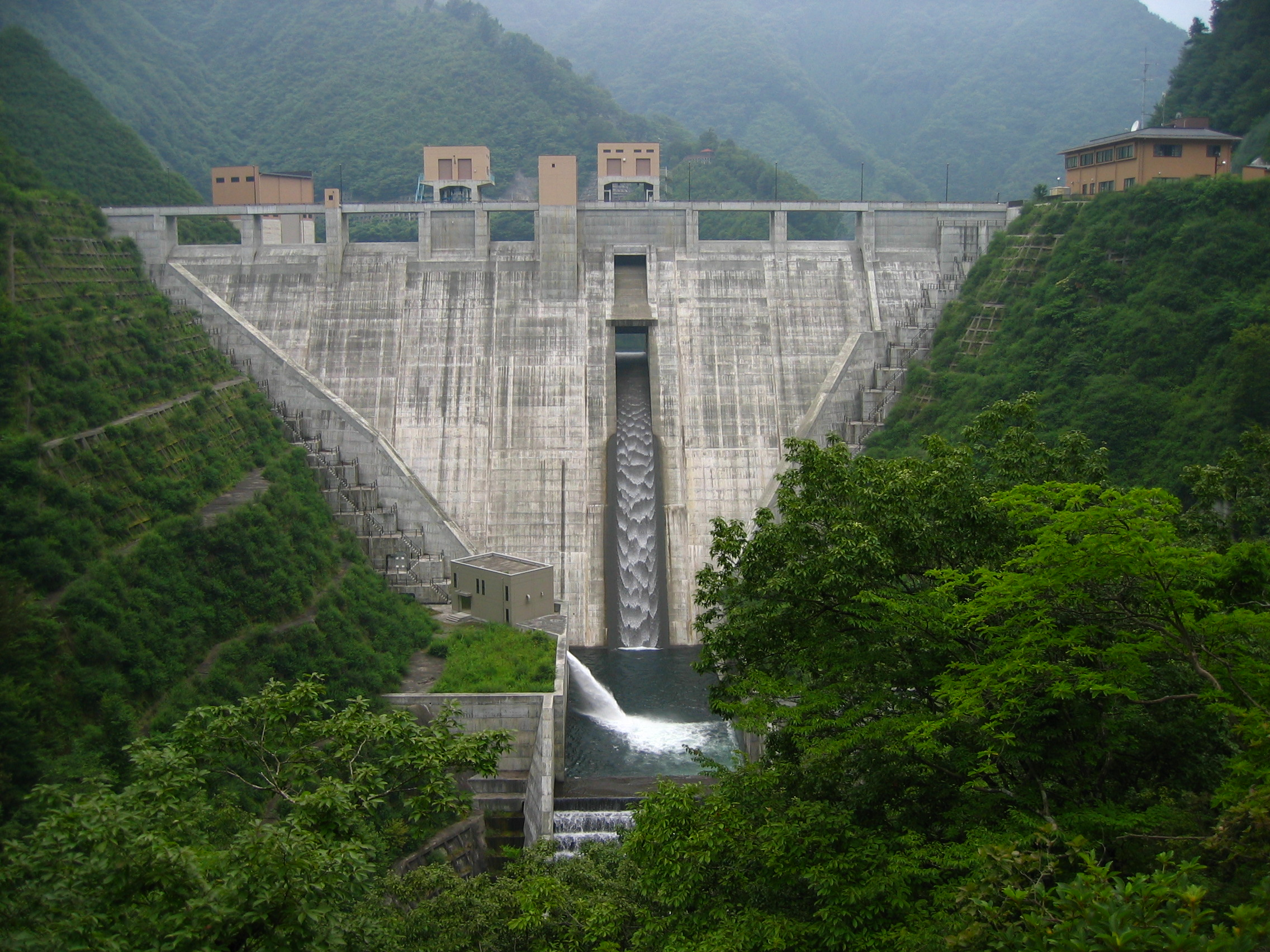 Fukashiro Dam (深城ダム) is a dam in Yamanashi, Japan.